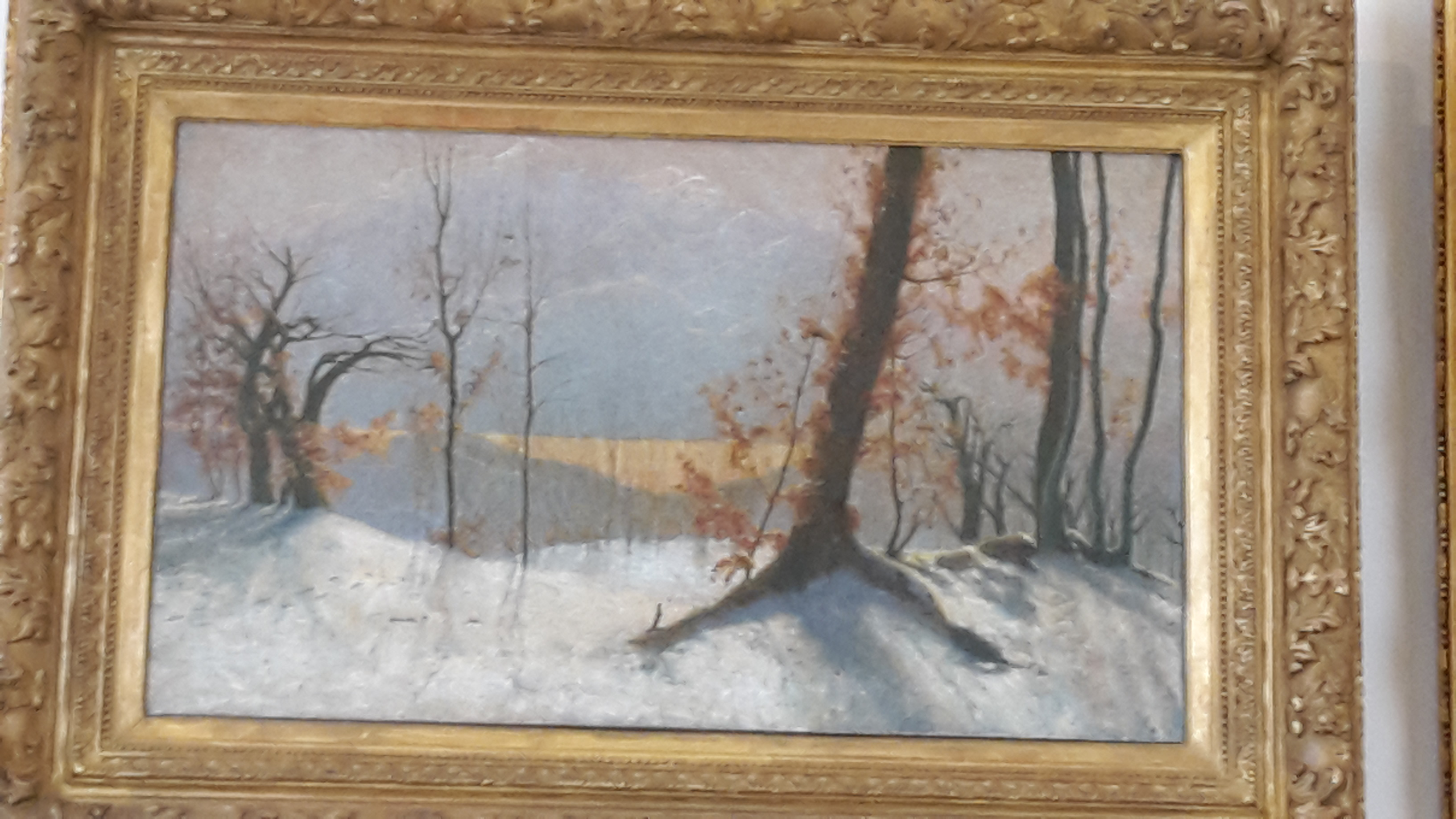 Tutto candore, opera di Vittore Grubicy de Dragon conservata alla Galleria d'arte moderna di Milano